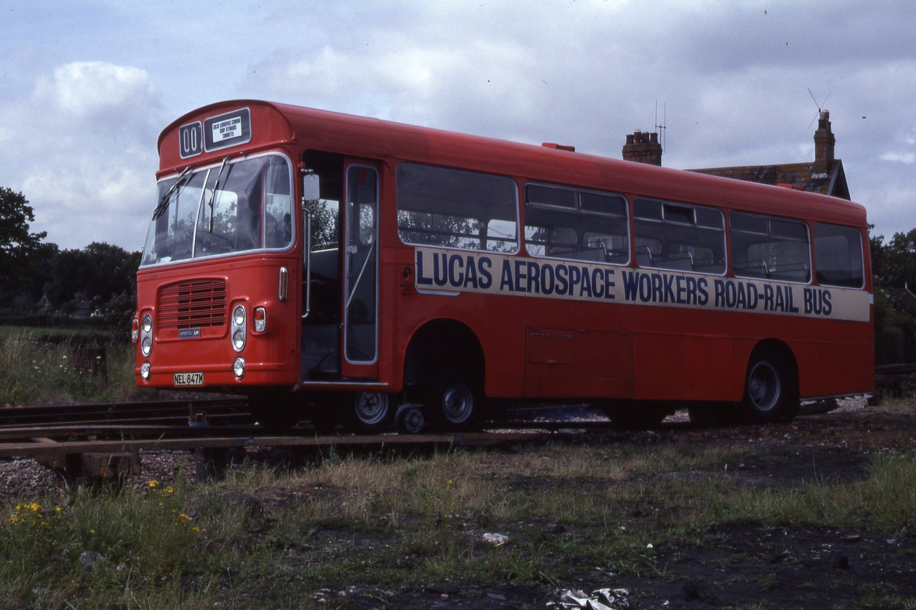 Scanned from 35mm slide.